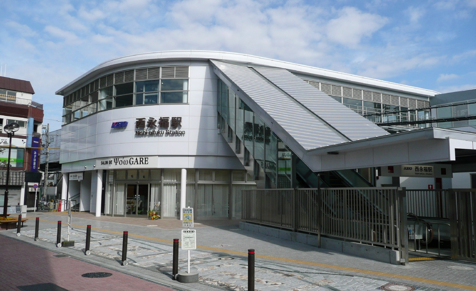 西永福駅